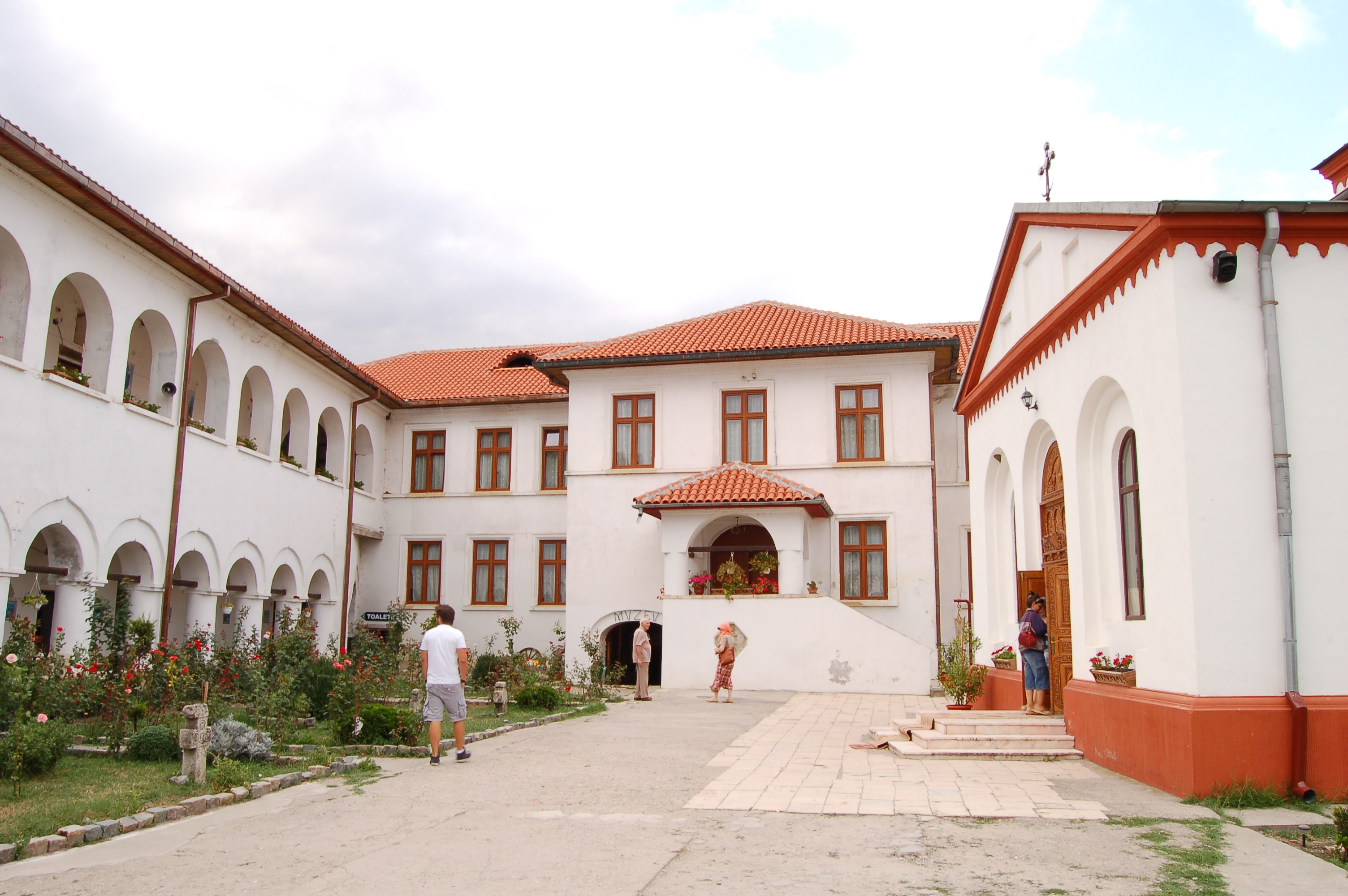 interiorul ansamblului manastirii comana 02